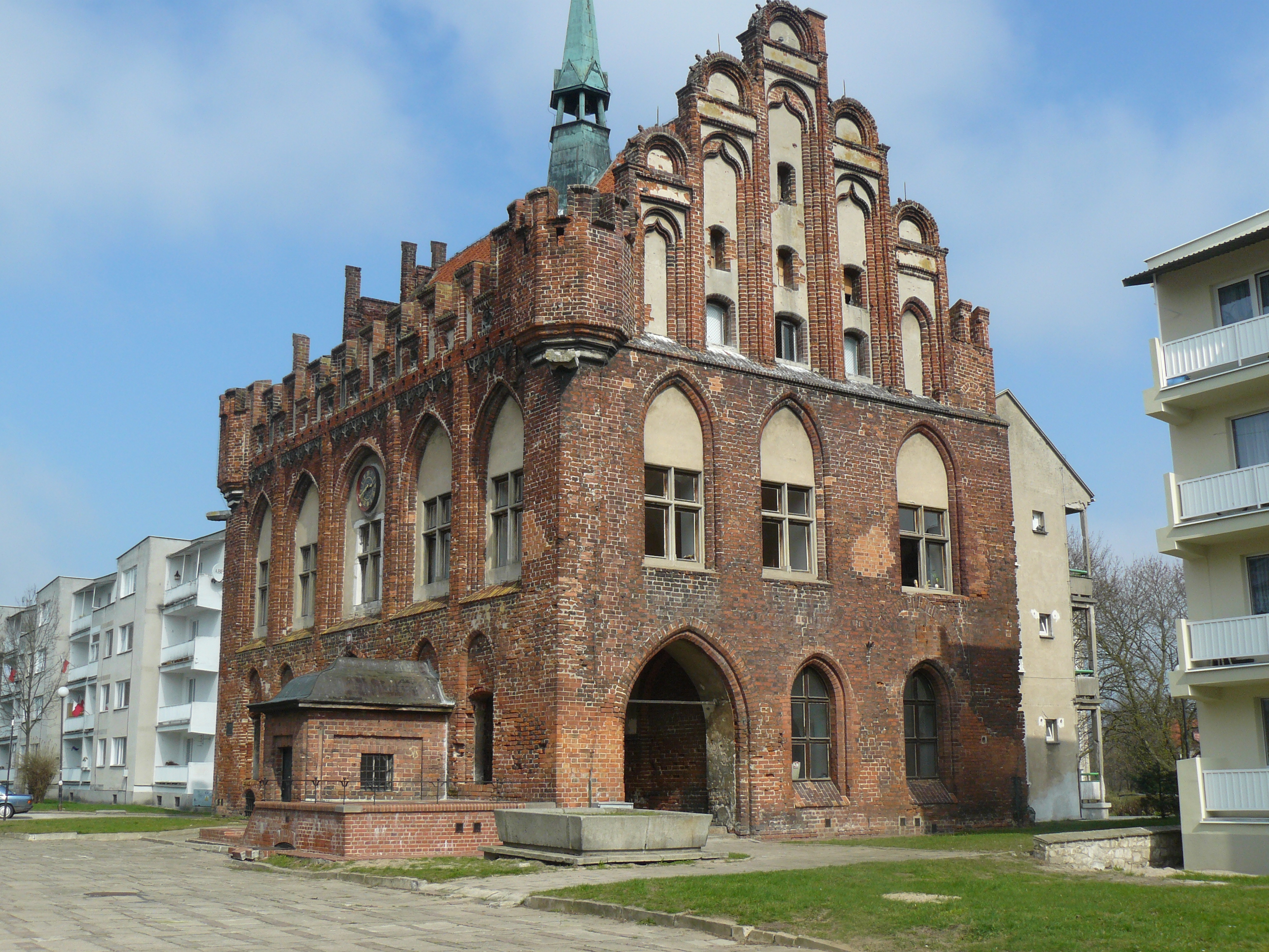 Malbork, ratusz, 2 poł. XIV-XIX